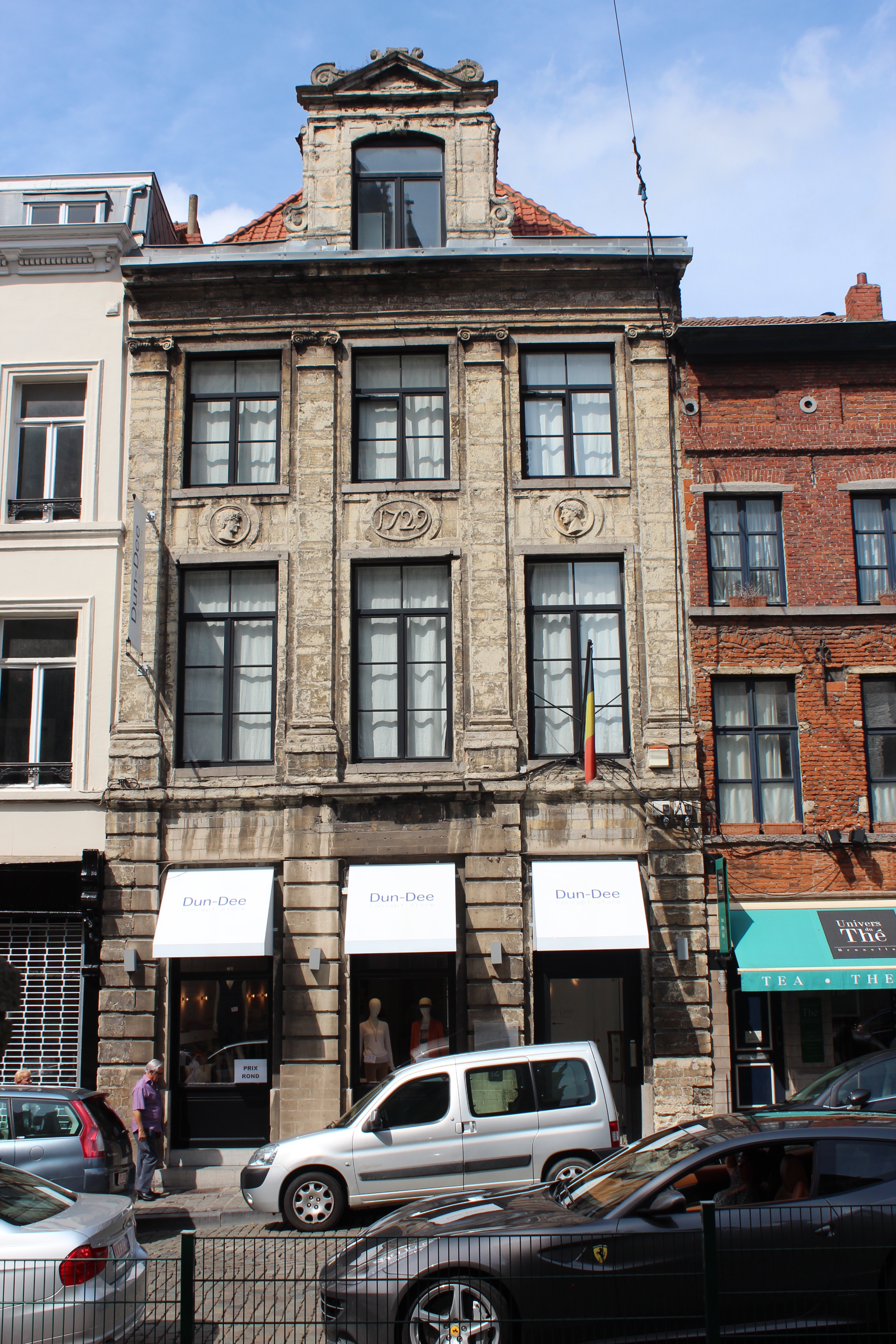 Rue Bodenbroek 12 à Bruxelles: Maison traditionnelle, Anc. Rég. Construit en 1729. Style: Louis XIV, Classicisme